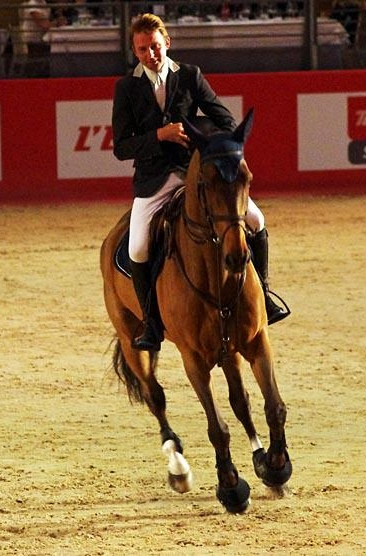 Olivier Guillon et Lord de Theize, à Equita'Lyon (lors de la cérémonie pour la victoire française dans la Coupe des Nations d'Aix-la-Chapelle).